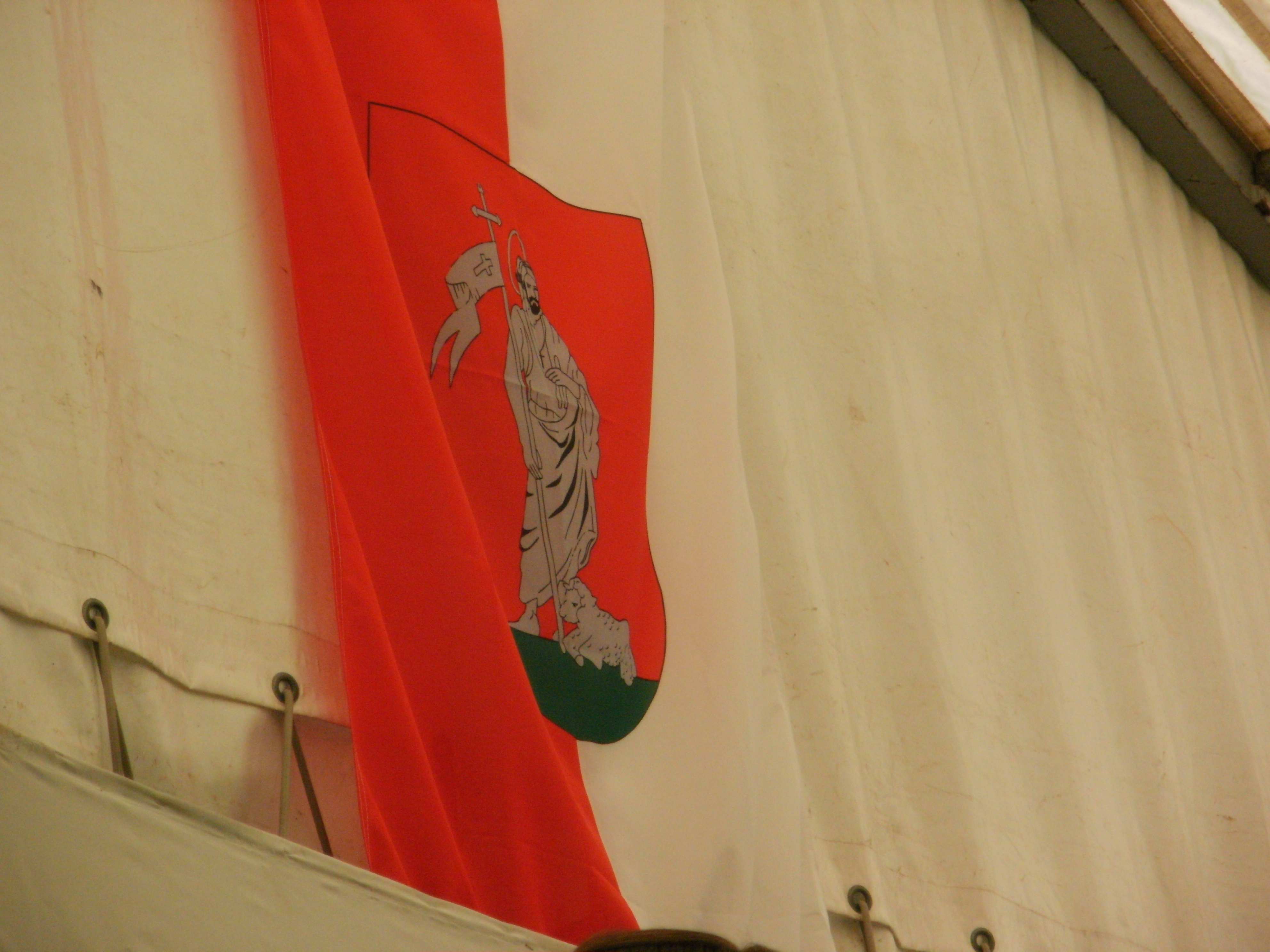 Felsőszölnök zászlója egy falunapon (Vas megye)